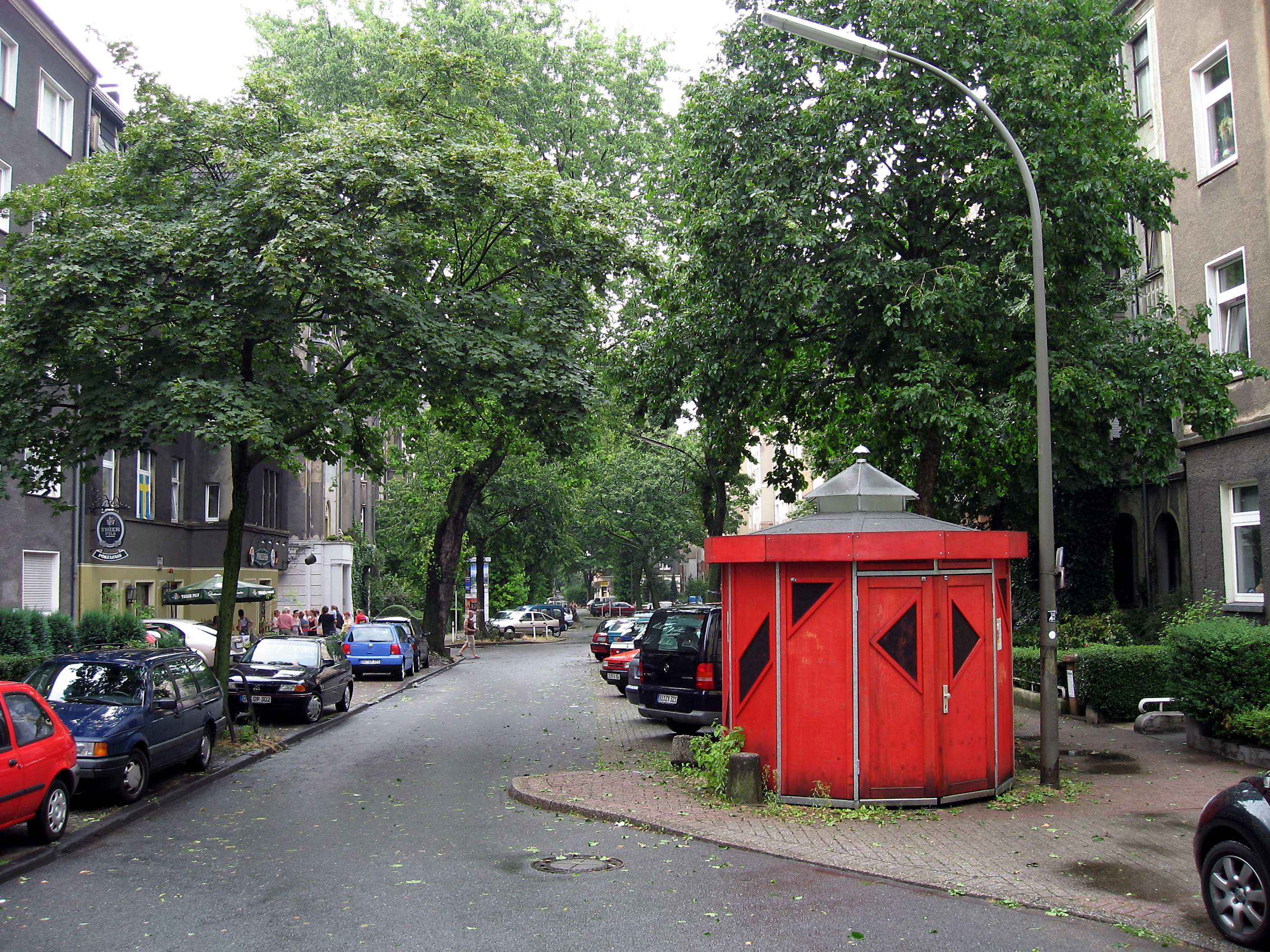 Dortmund, Kreuzviertel, Arneckestraße mit Fahrradgarage